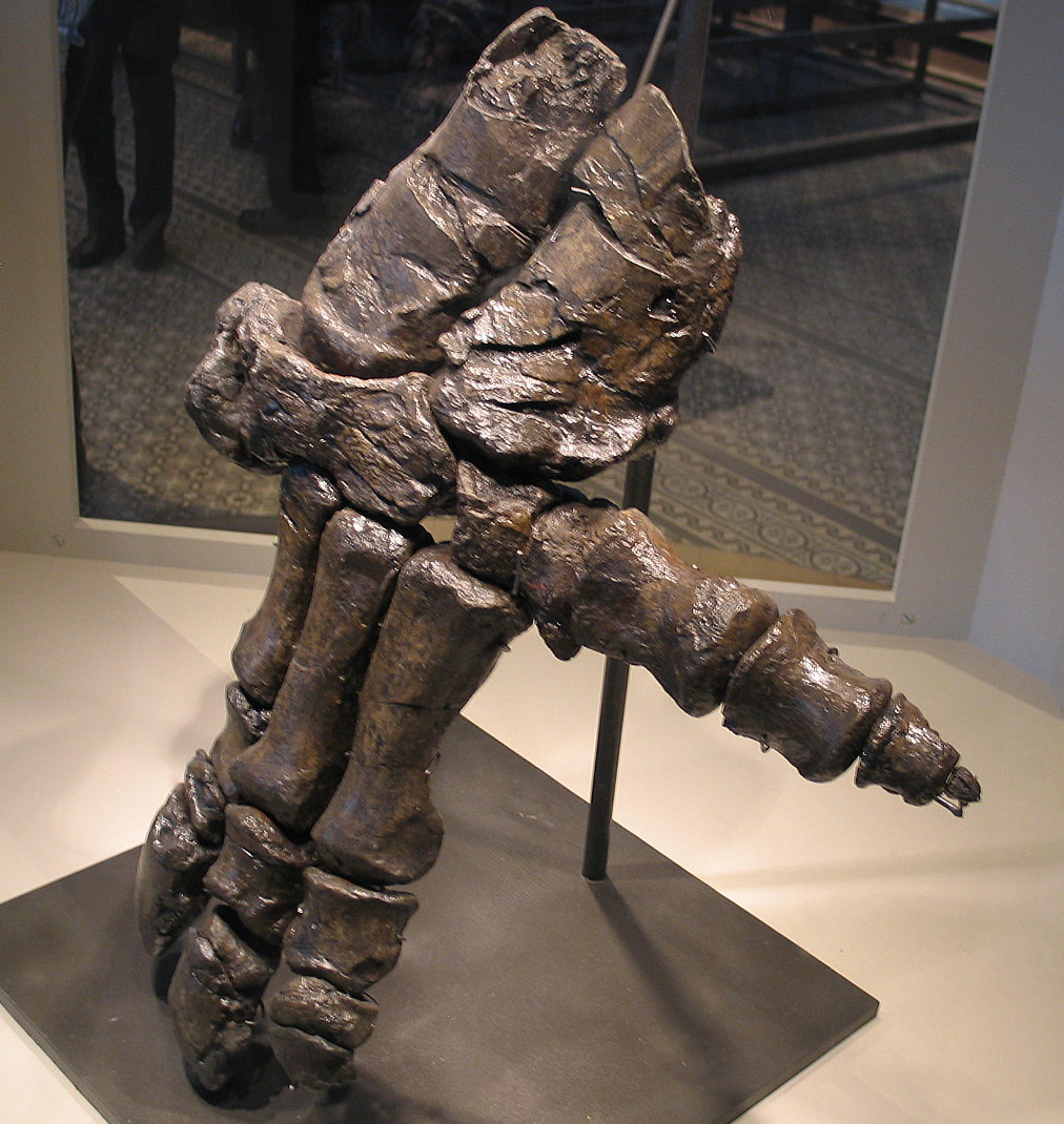 Hand of an Iguanodon at the Museum voor Natuurwetenschappen in Brussels, Belgium